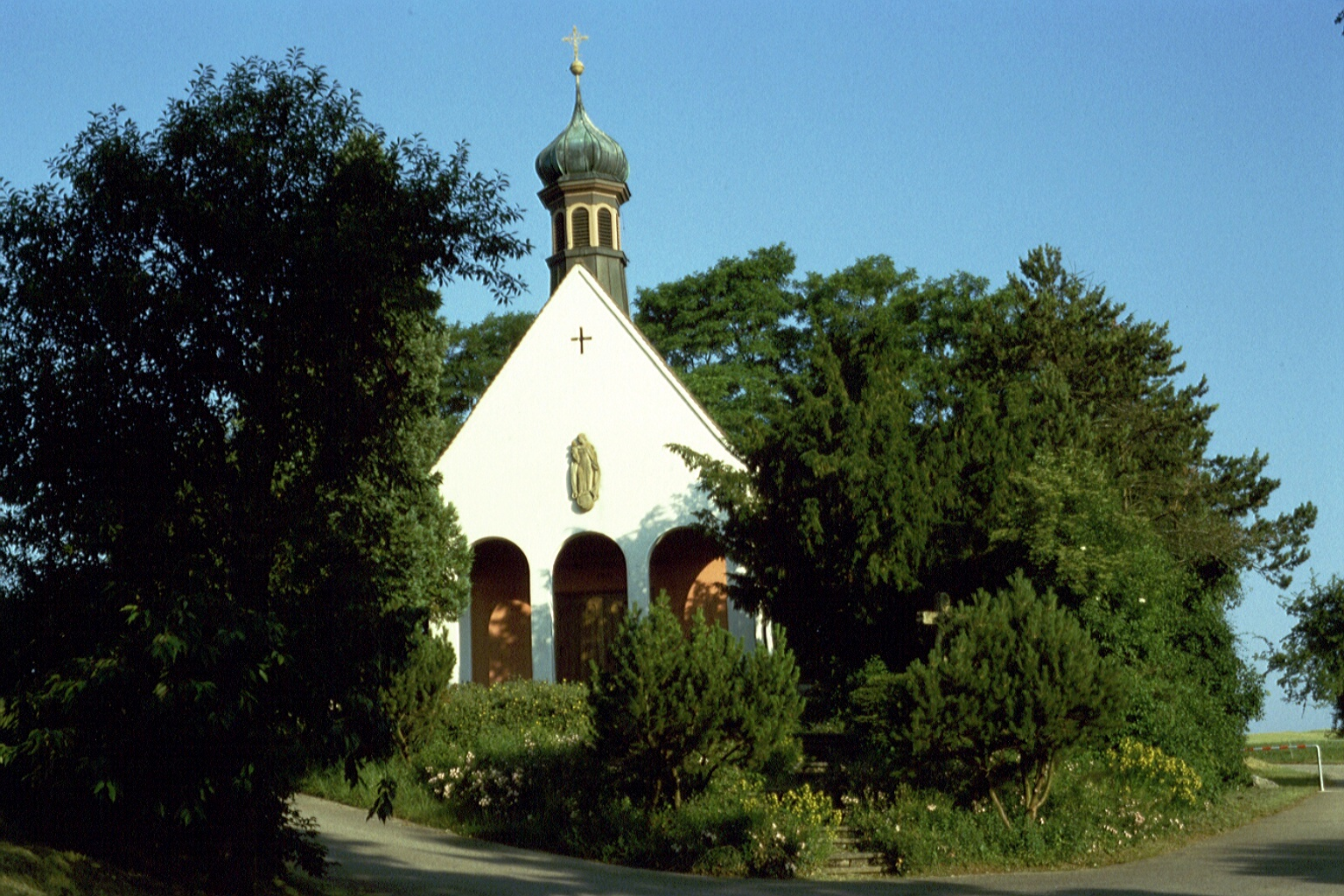 Die Bergkapelle in Erzingen, Klettgau (Gemeinde), Landkreis Waldshut, Baden-Württemberg. Sie wurde 1945 nach einem Gelübde der Bevölkerung errichtet, das sich auf die Abwendung einer Evakuierungsdrohung durch die französische Armee am Kriegsende 1945 bezogen hatte.